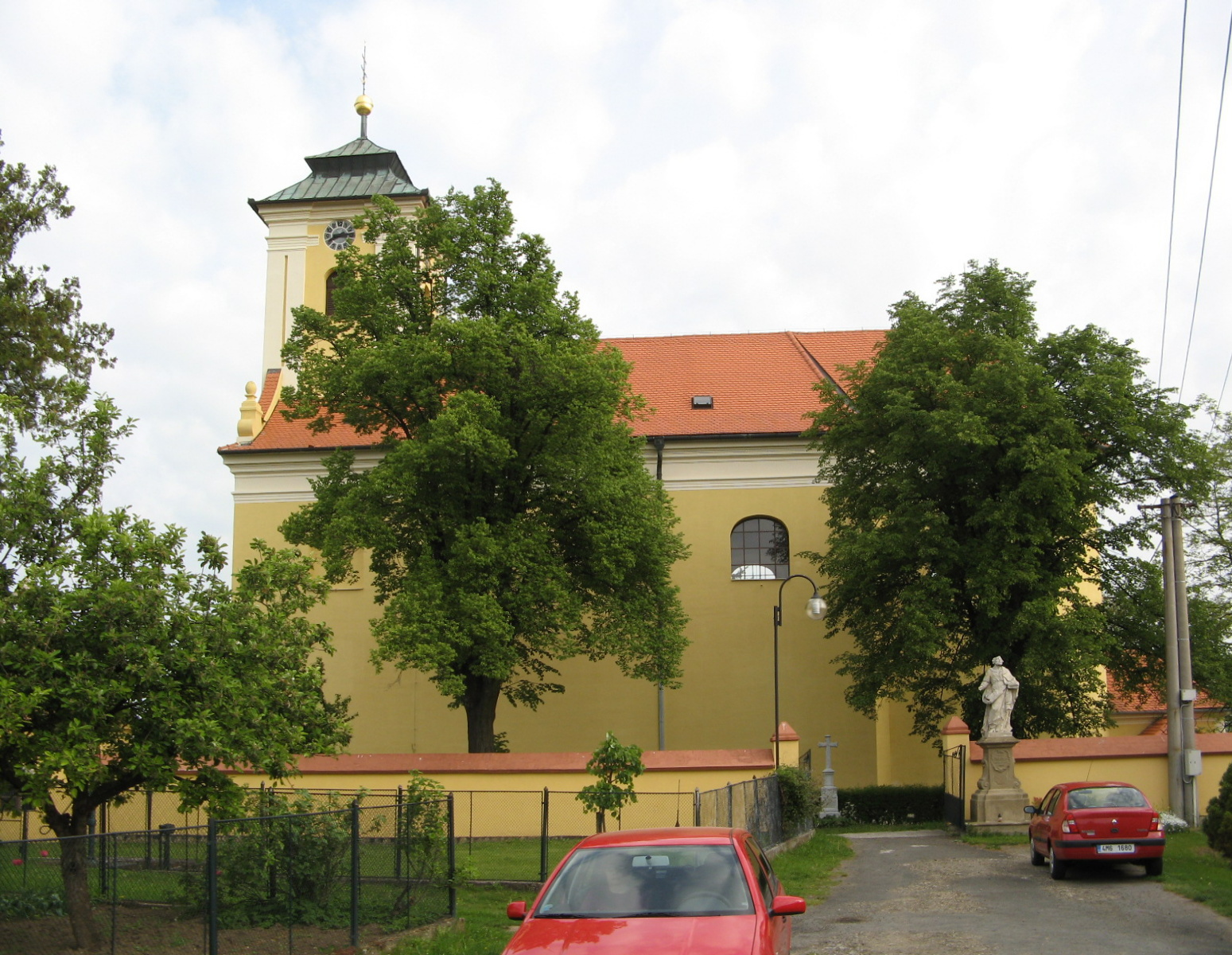 Kostel sv. Ondřeje (Pavlovice u Kojetína), Pavlovice u Kojetína